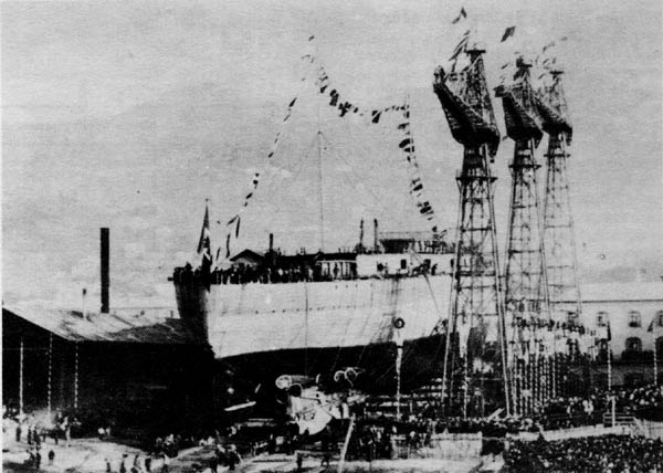 Giulio Cesare launched